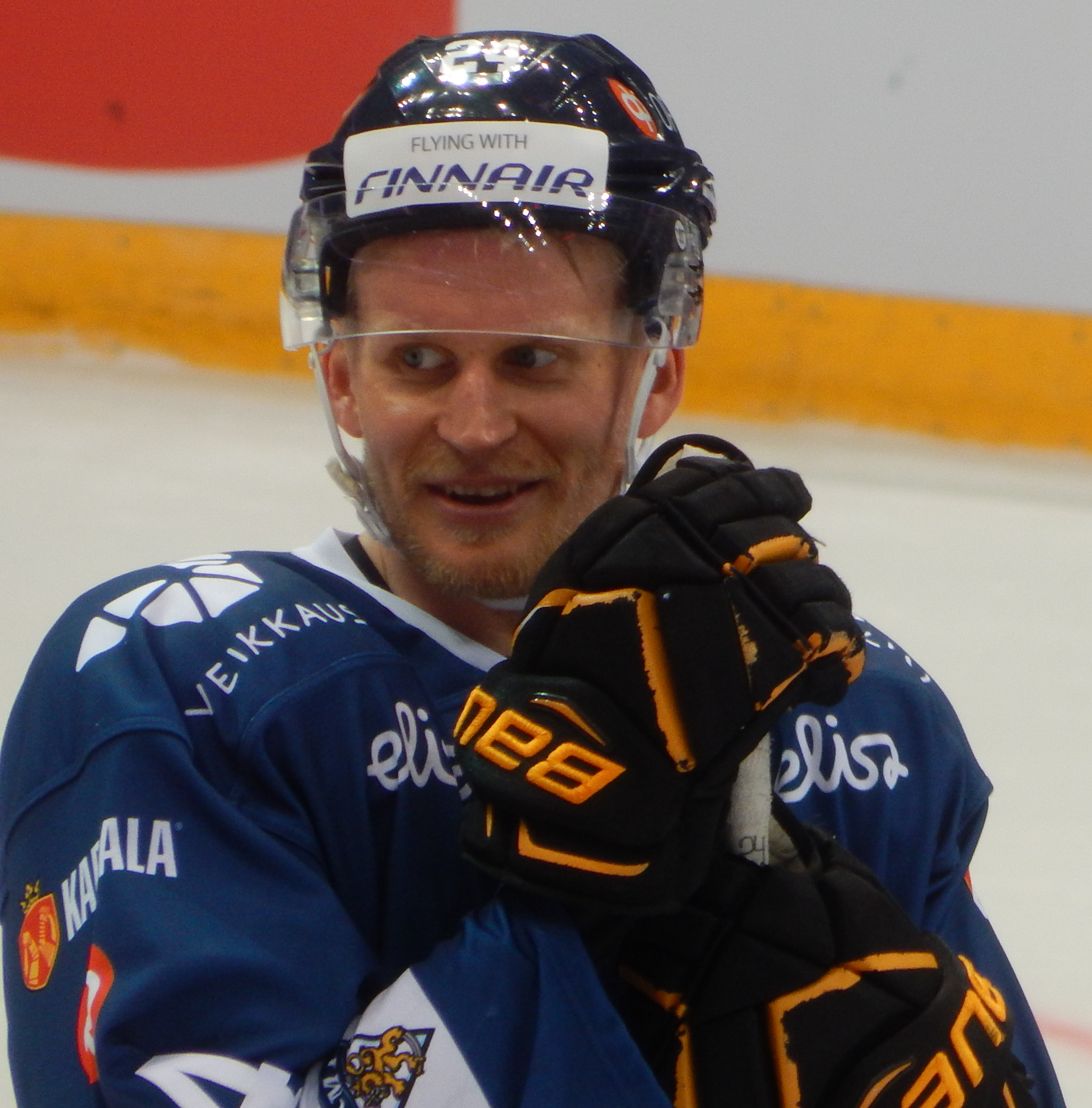 Кубок Первого Канала 2017, матч Финляндия - Южная Корея (15 декабря 2017) 24 LAJUNEN,Jani